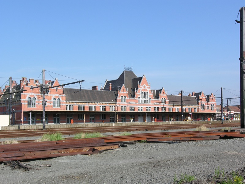 station Essen, Belgium